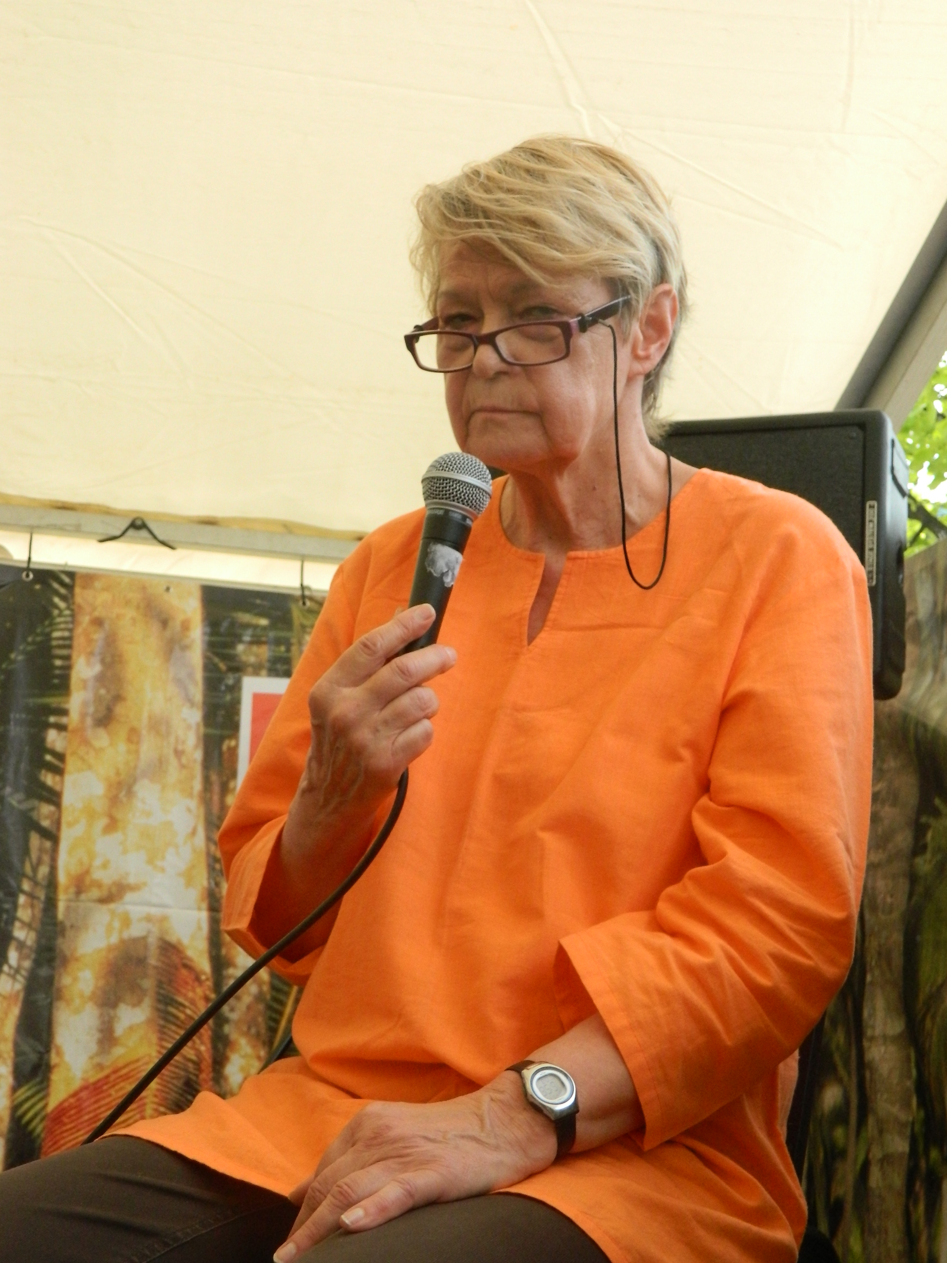 Liisa Liimatainen Maailmakylässä tapahtumassa toukokuussa 2014